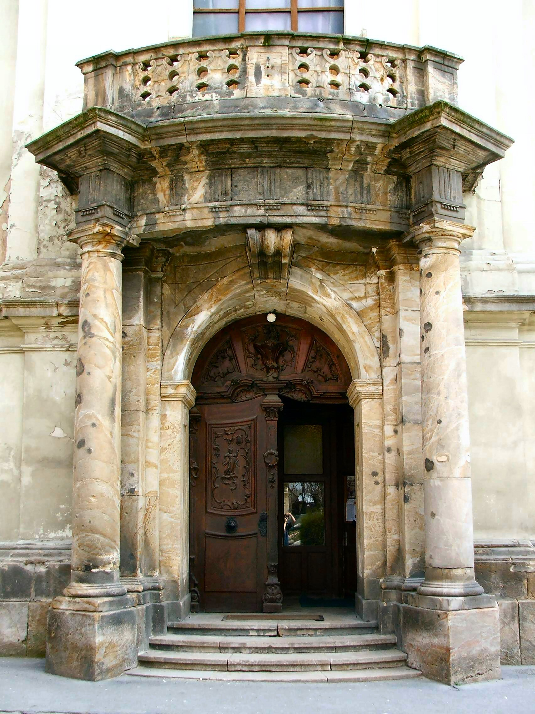 Esztergom, Hungary St Peter's & St. Paul's church